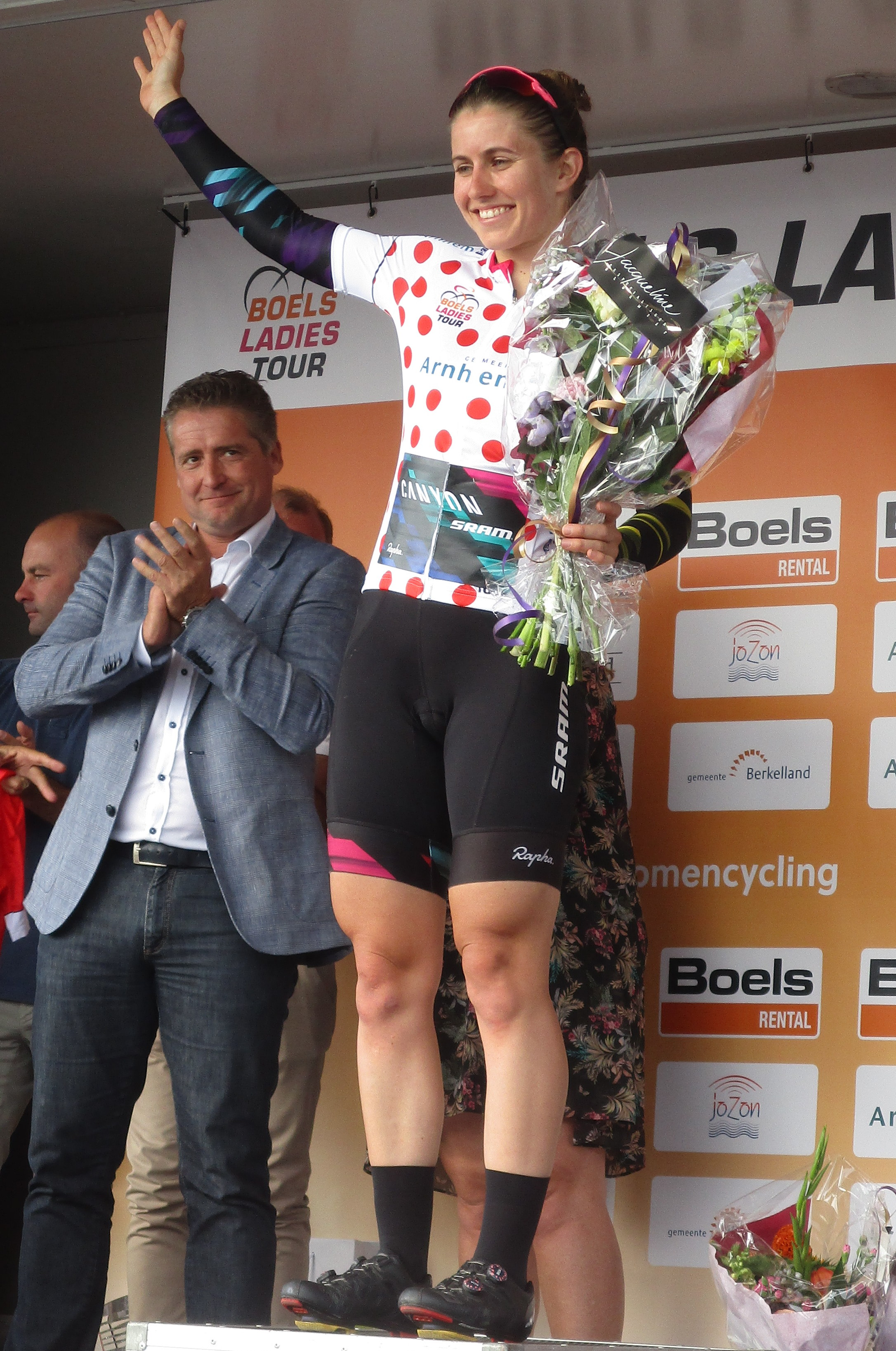 Huldiging van de winnaars van de Boels Ladies Tour 2017 op het Tom Dumoulin Bike Park in Sittard-Geleen.